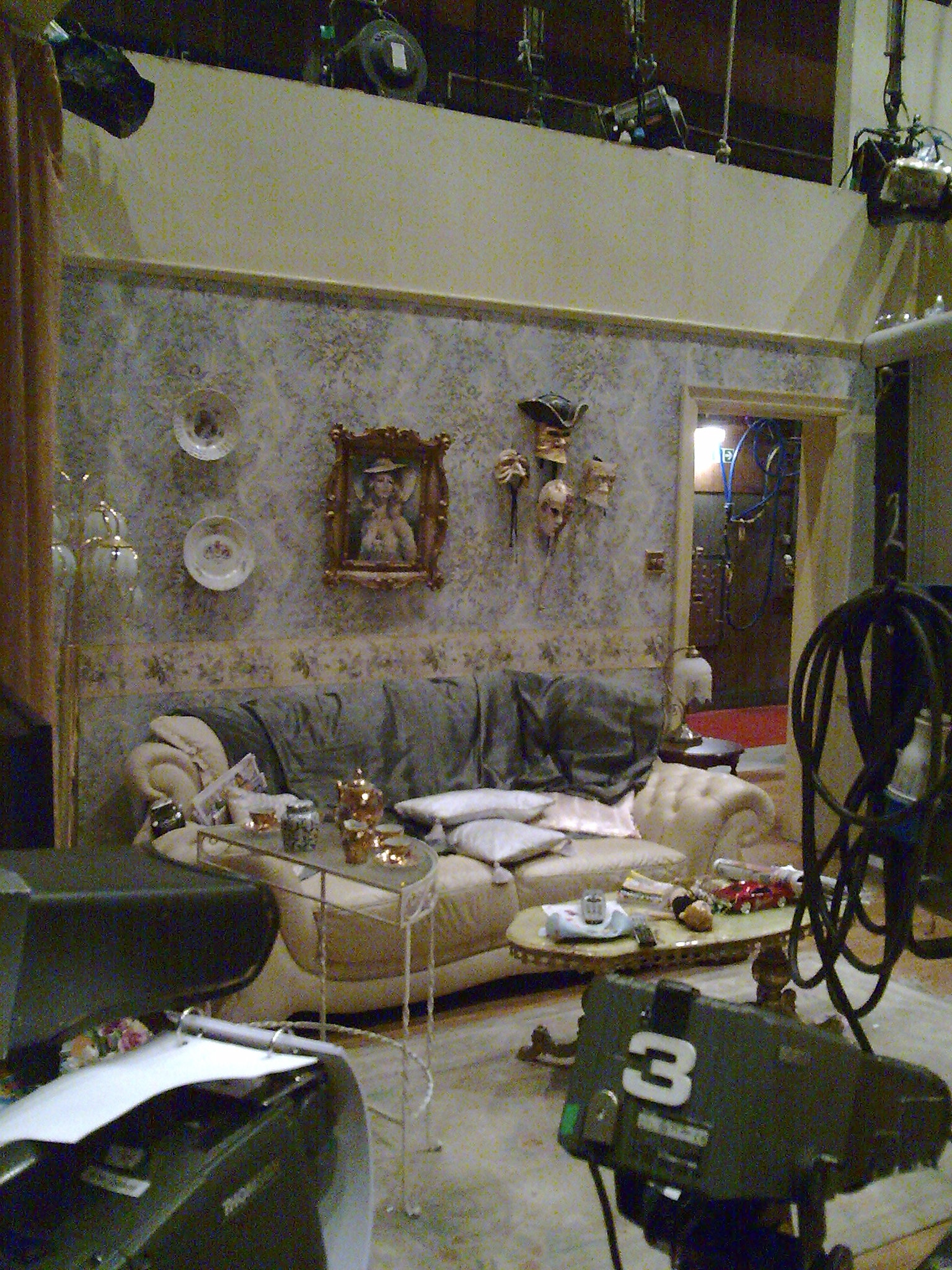 Eastenders Set